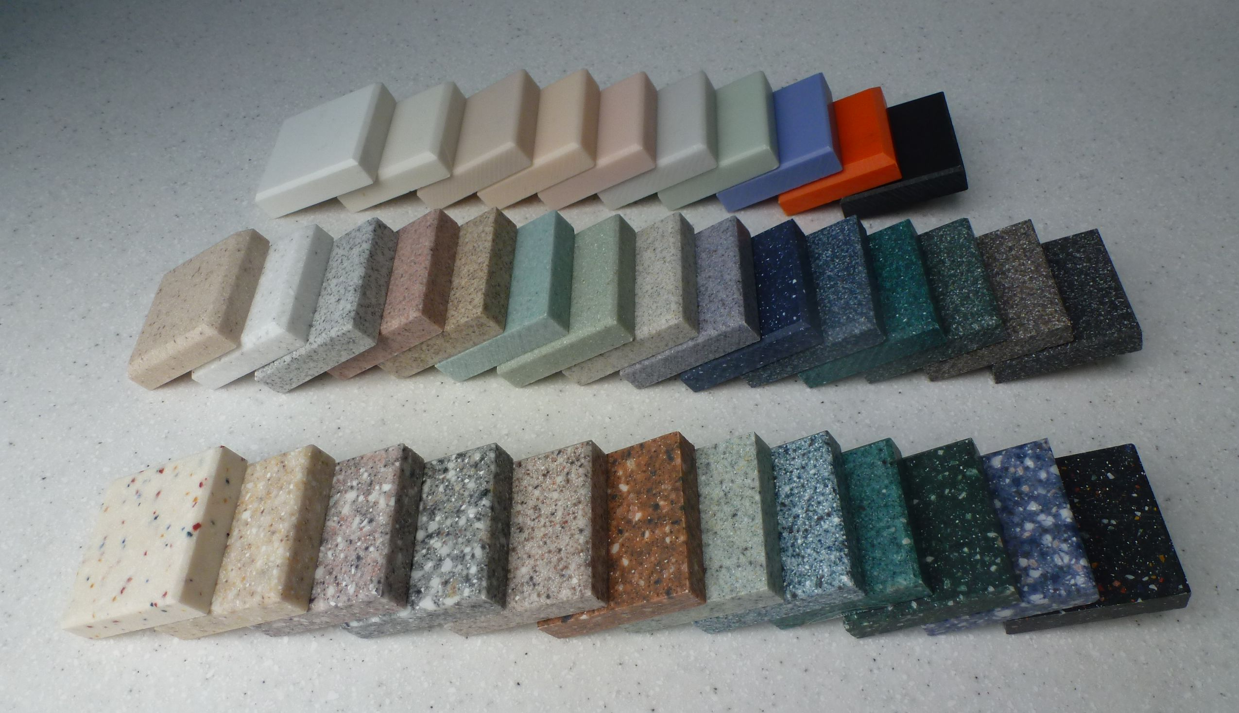 Verschiedene Farb- und Musterproben von Corian